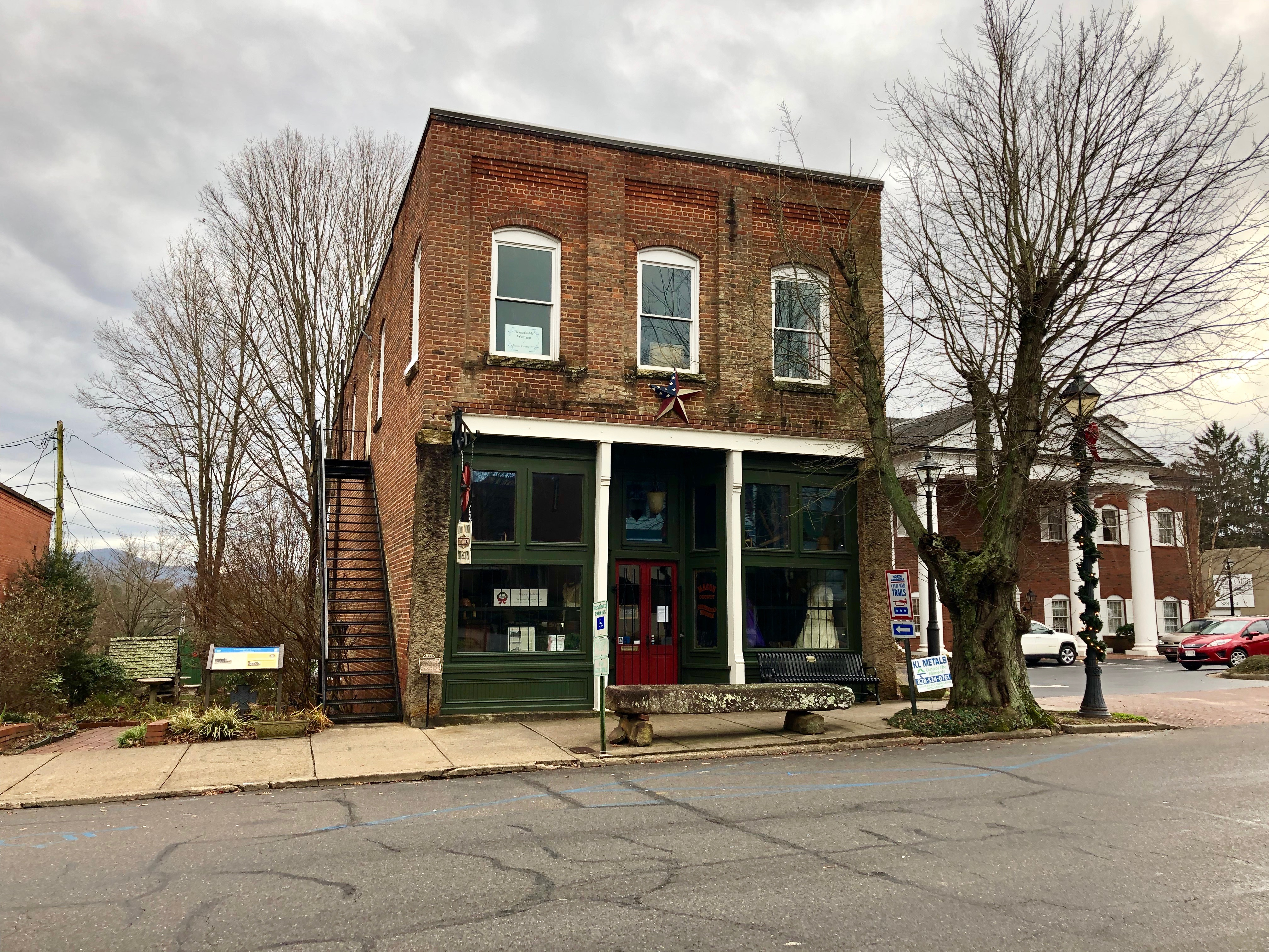 Pendergrass Building, Franklin, NC